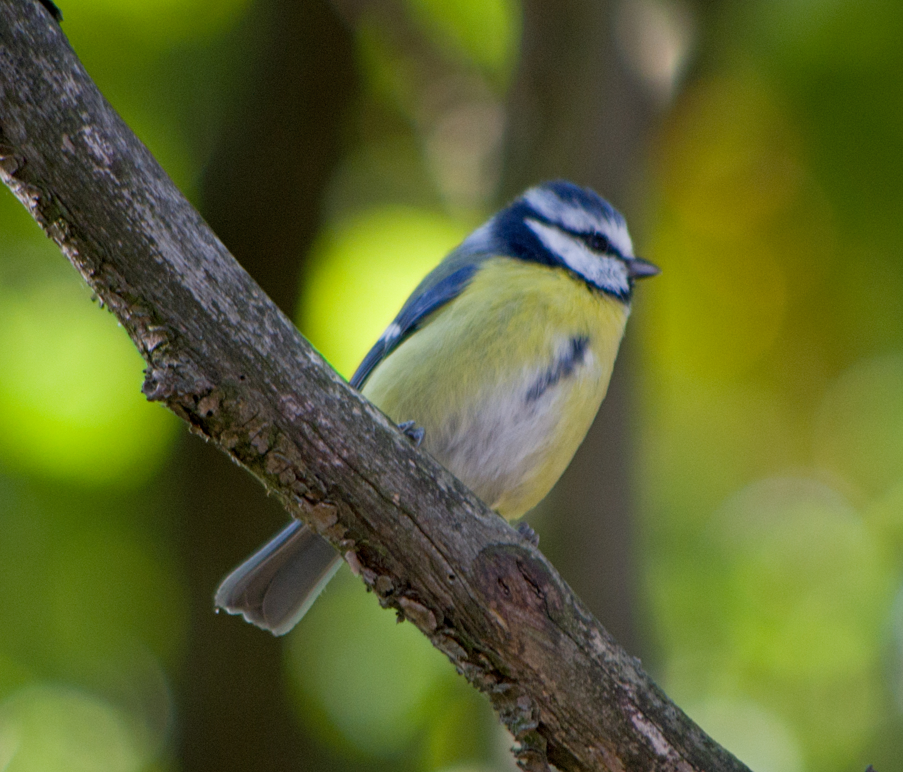 Обыкновенная лазоревка / Cyanistes caeruleus / Eurasian blue tit / Син синигер / Blaumeise